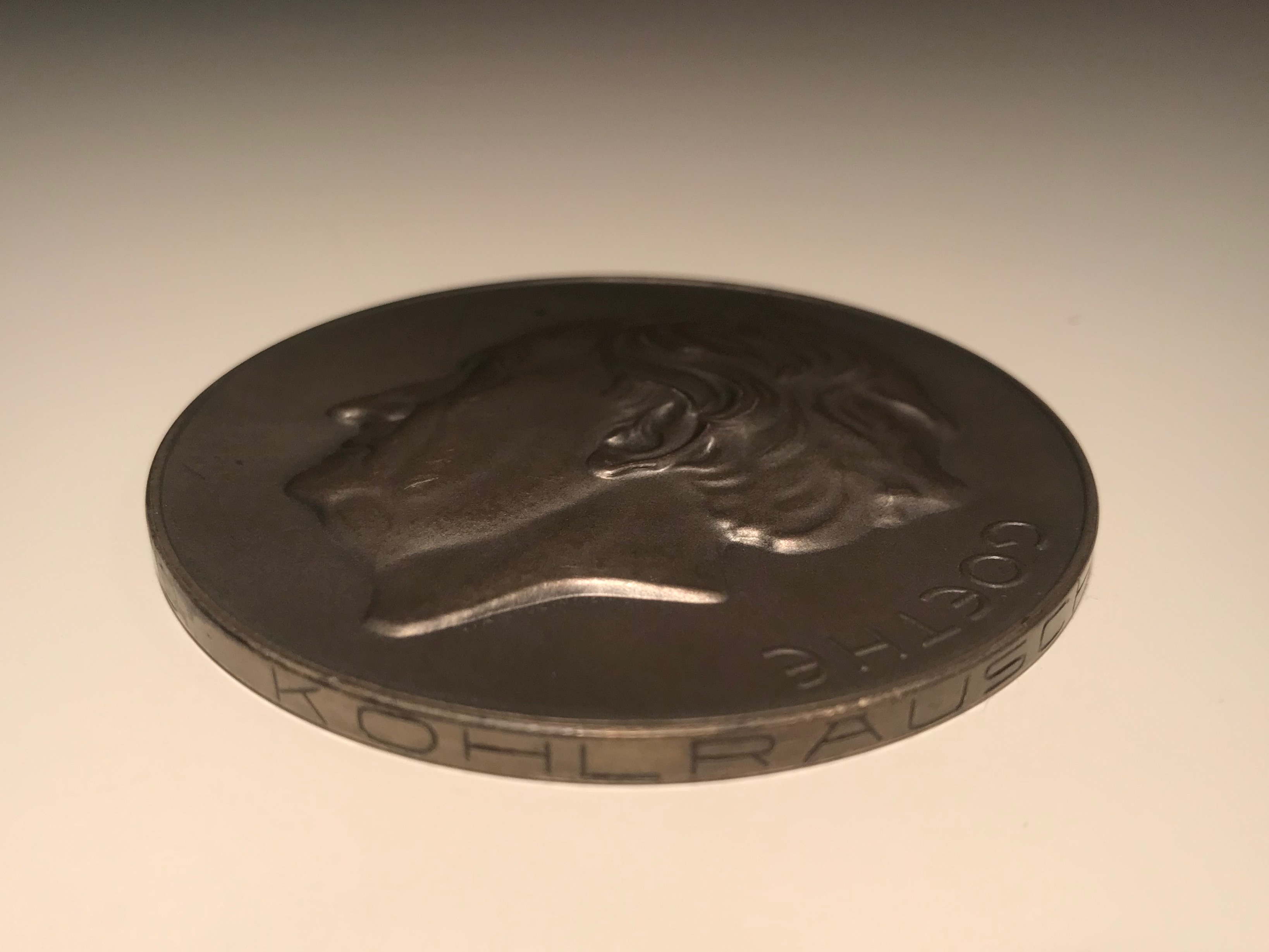 An Kohlrausch verliehene Goethe-Medallie